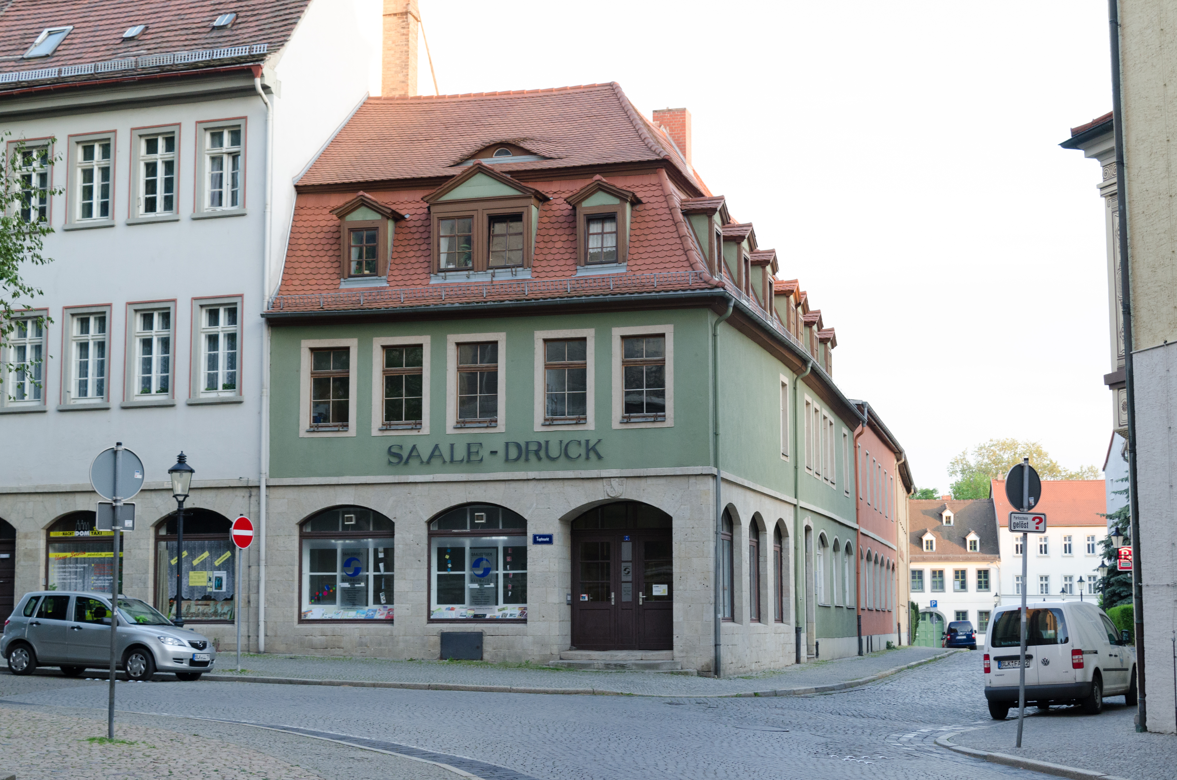 Naumburg, Topfmarkt 7